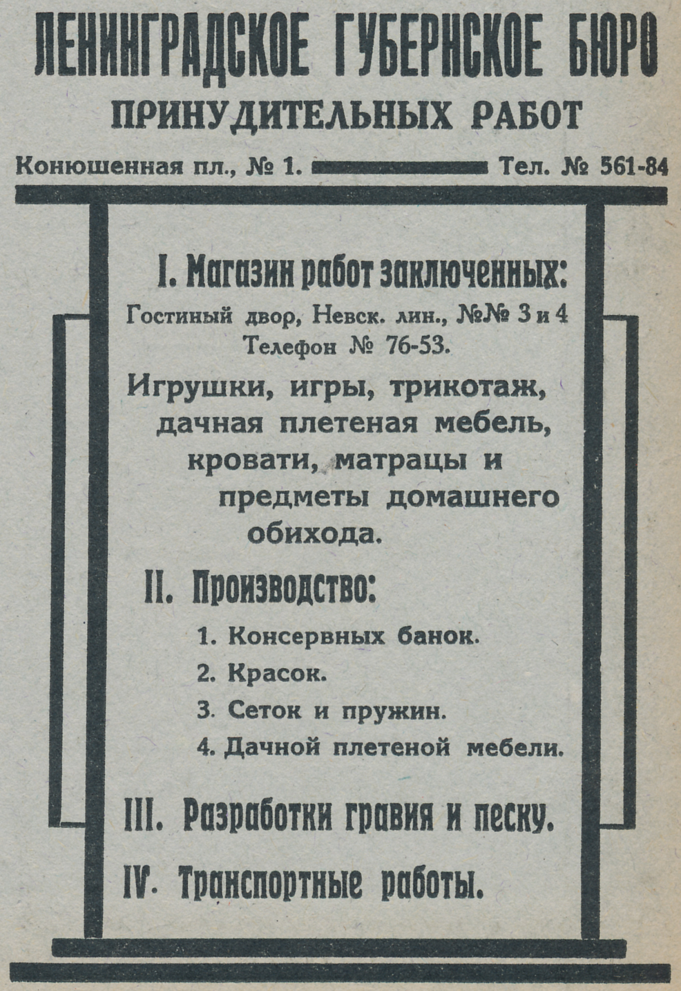 Реклама продукции и работ заключенных, 1927 год.